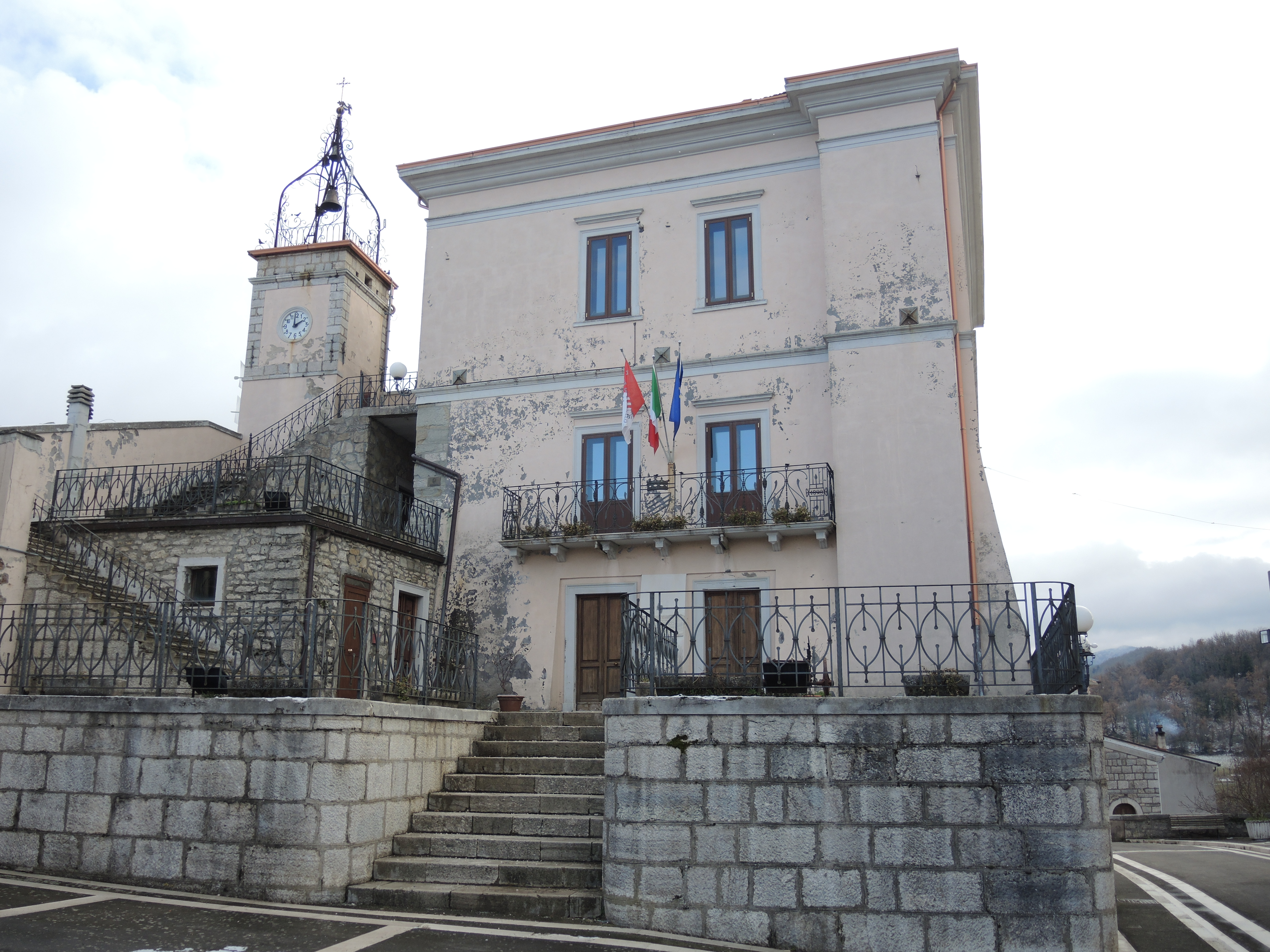 Borrello